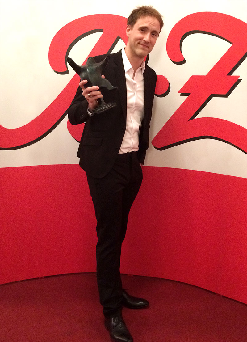 Sebastian Achilles mit dem gewonnenen "Berliner Bär" - Award für das Udo Lindenberg Musical "Hinterm Horizont" 2015